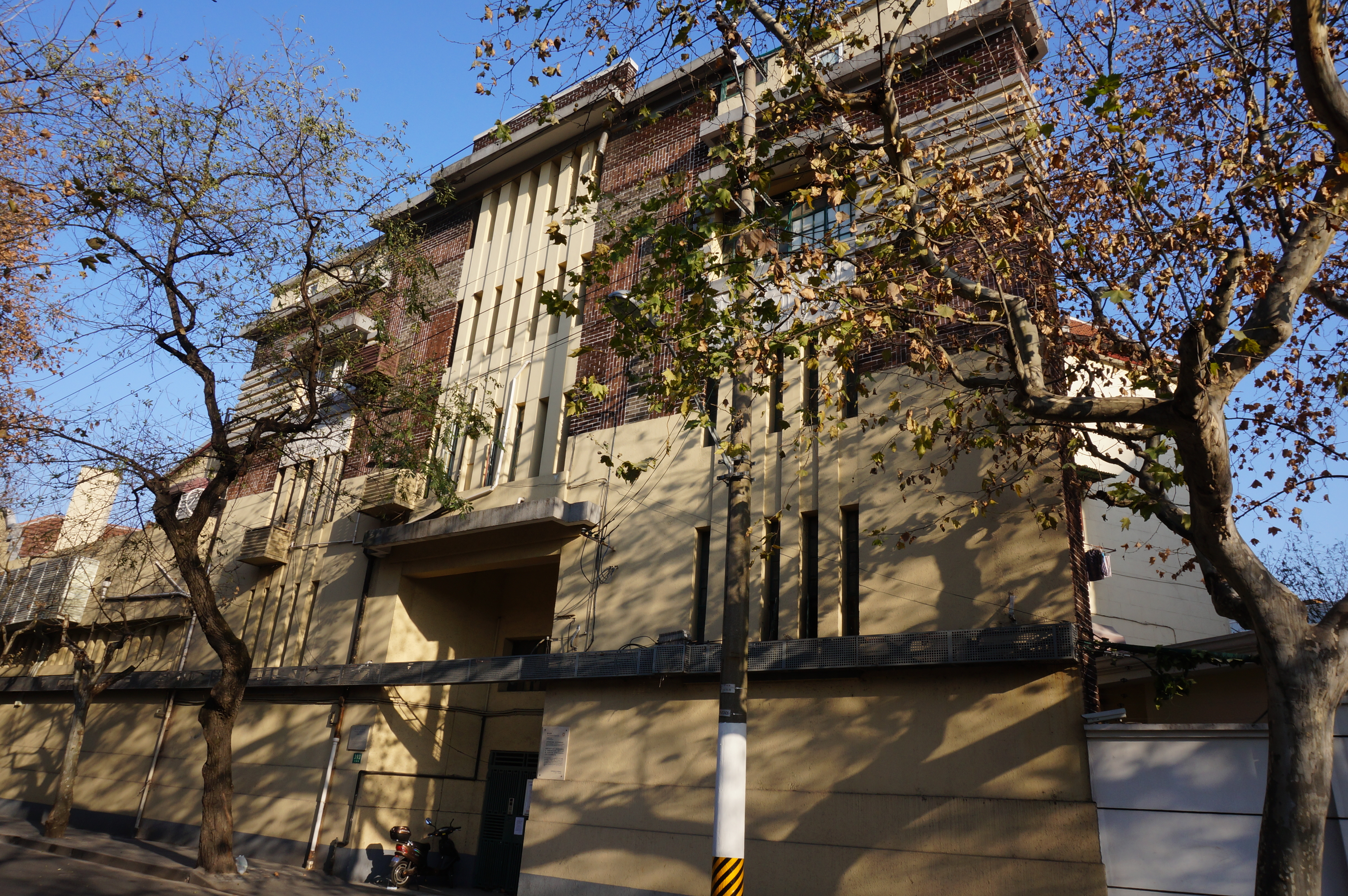 中文（中国大陆）: 上海市第三批优秀历史建筑——武康路393号黄兴故居